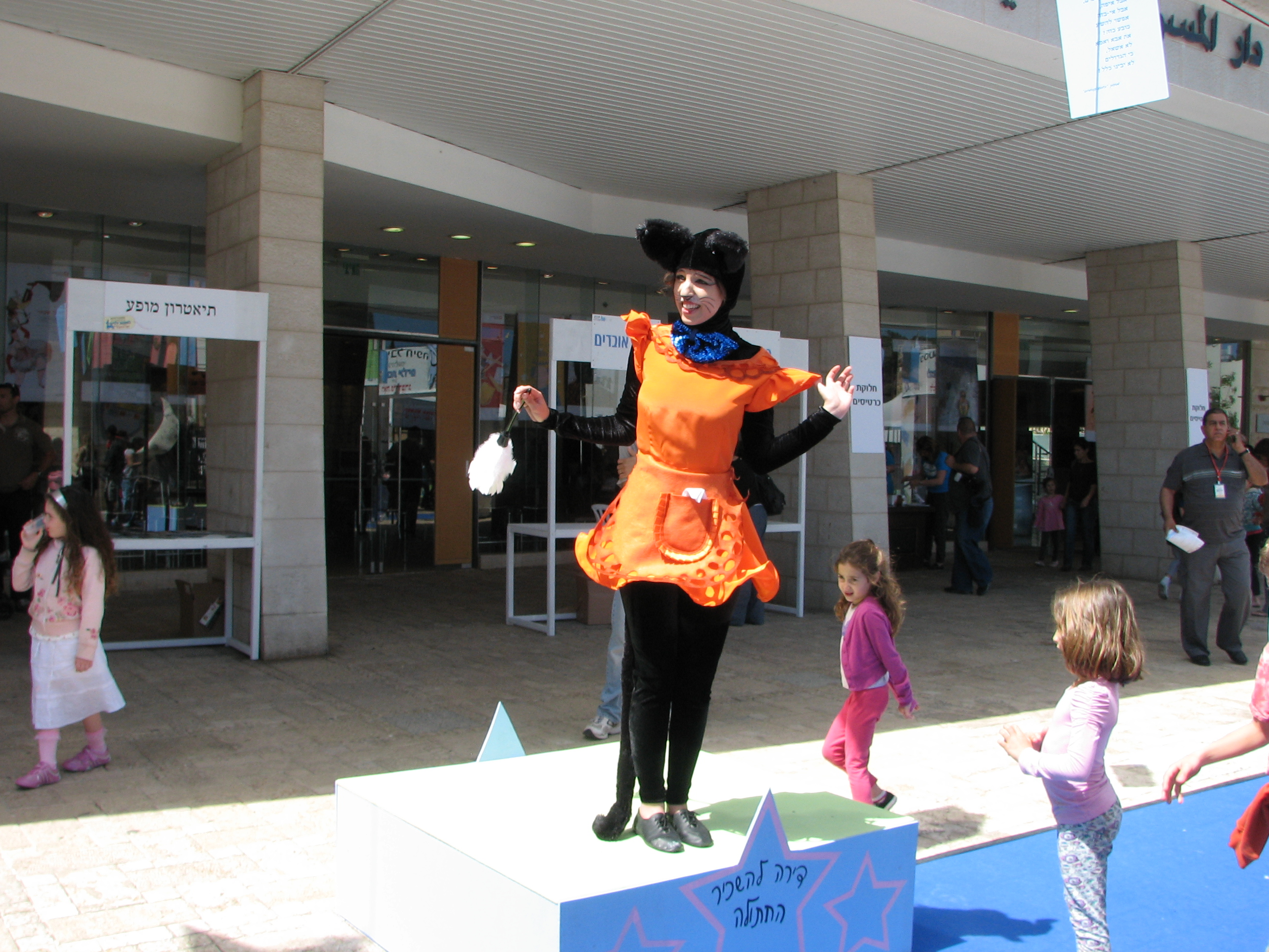 The 21 Haifa International Children's Theater Festival. The festival has become a tradition that occures annually, during the Passover Holiday. פסטיבל חיפה הבינלאומי להצגות ילדים הוא פסטיבל לתיאטרון ילדים, המתקיים בחיפה מדי שנה בימי חול המועד פסח. בשנת 2011 נערך הפסטיבל בפעם ה-21. הפסטיבל נערך במשכן תיאטרון חיפה שבשכונת הדר הכרמל, בגן בנימין הסמוך לו ובאתרים נוספים בשכונה, ובכללם מוזיאון המדעטק. התפיסה האמנותית של הפסטיבל היא הפיכת ההצגות המועלות באולמות והאירועים שמחוץ להם להפנינג לילדים. הפסטיבל אורך כשלושה ימים, שבמהלכם מועלים עשרות הצגות ומופעים. פסטיבל-21 הוקדש לספריה של לאה גולדברג החתולה מדירה להשכיר